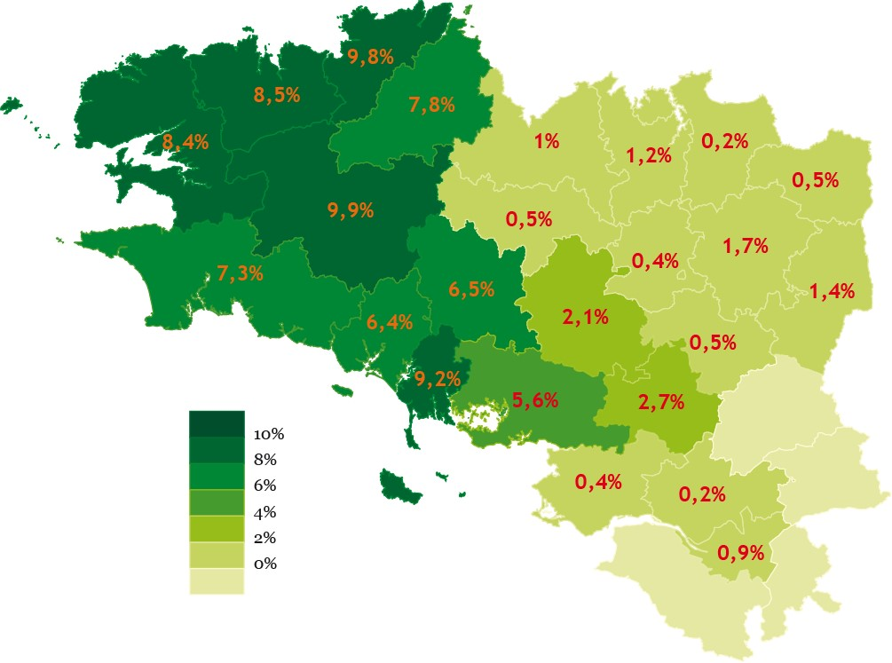 % a skolidi er 1añ derez divyezhek dre vro e 2018